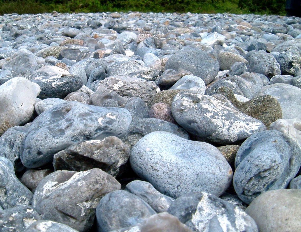 Naturschutzgebiet N 43A „Steinfelder in der Schmalen Heide“ bei Mukran auf Rügen: Feuersteinfelder